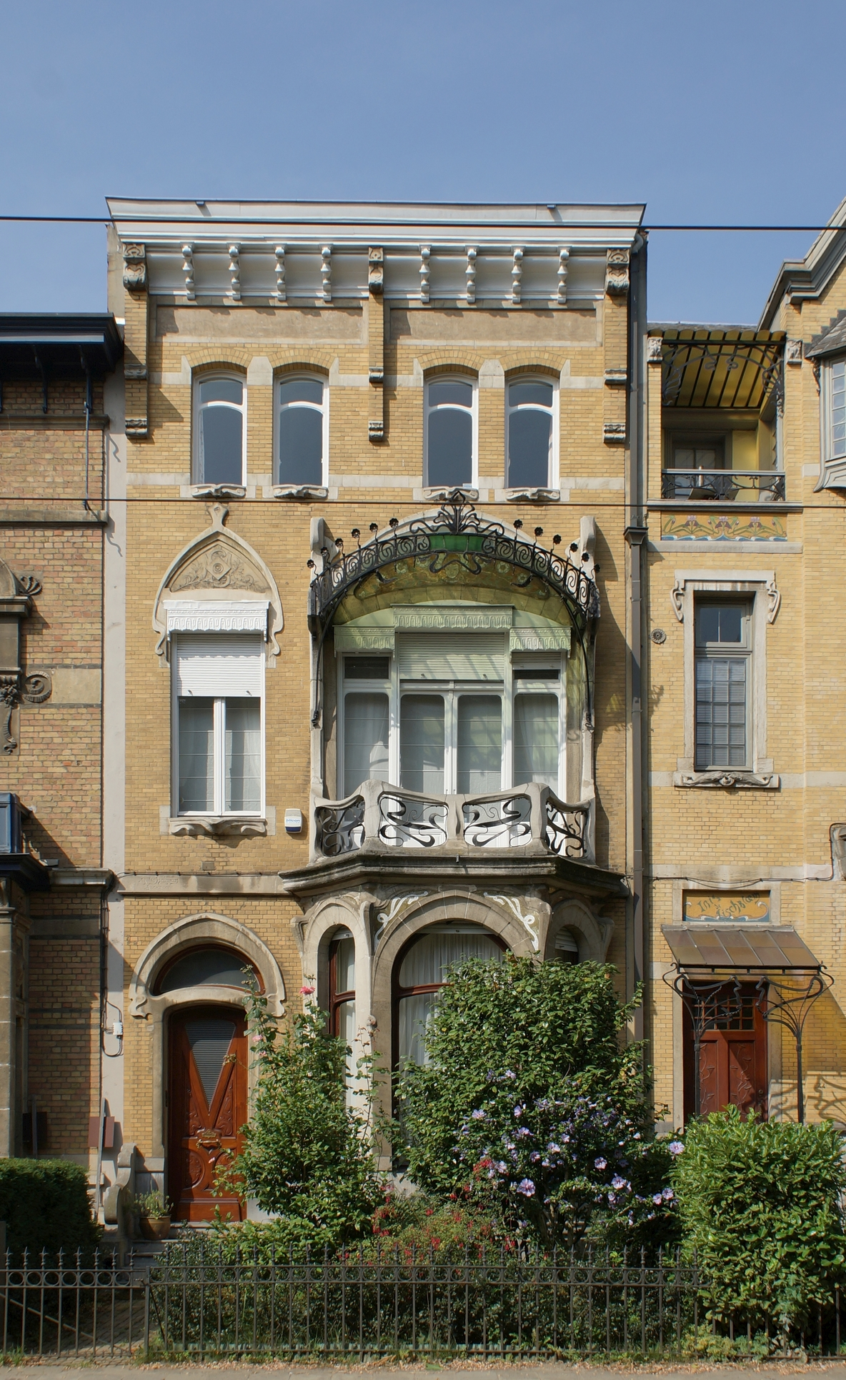 Berchem (Antwerpen), Cogels-Osylei 46. Burgershuis in "Art Nouveau"-stijl, ontworpen door architect Jules Hofman.